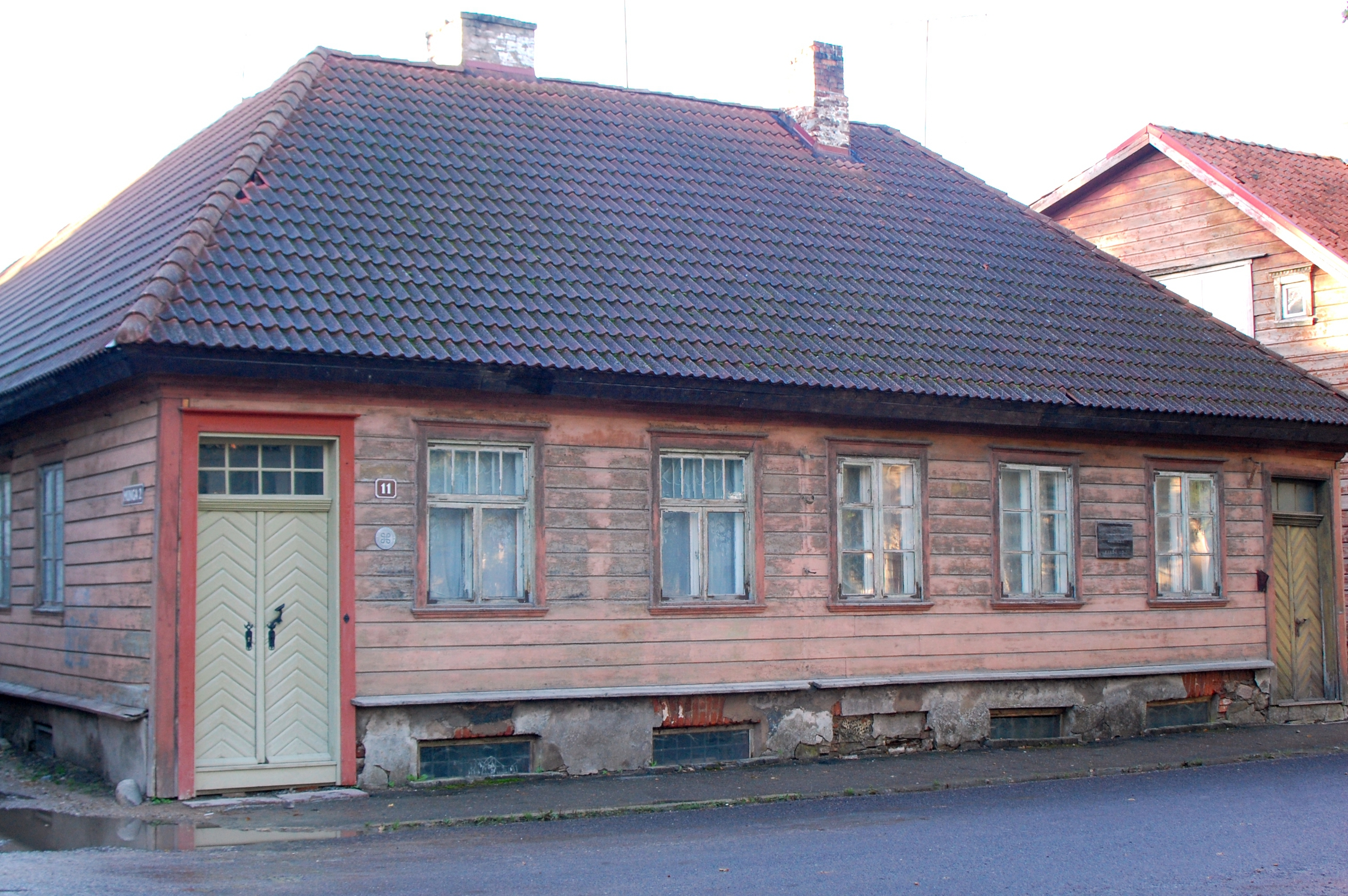 Elamu Viljandis Lossi 11, 19.saj.